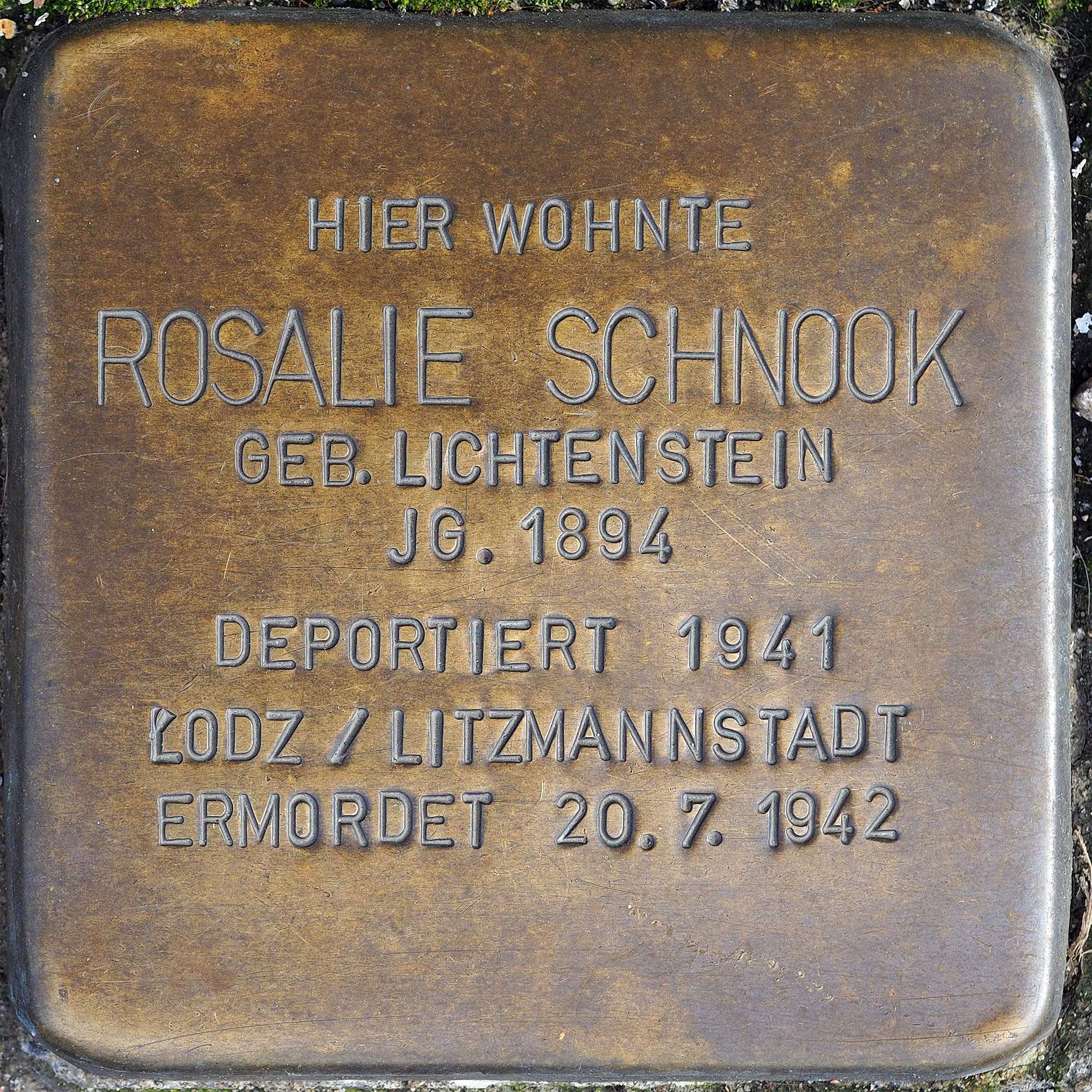 Stolpersteine MG: Schnook, Rosalie